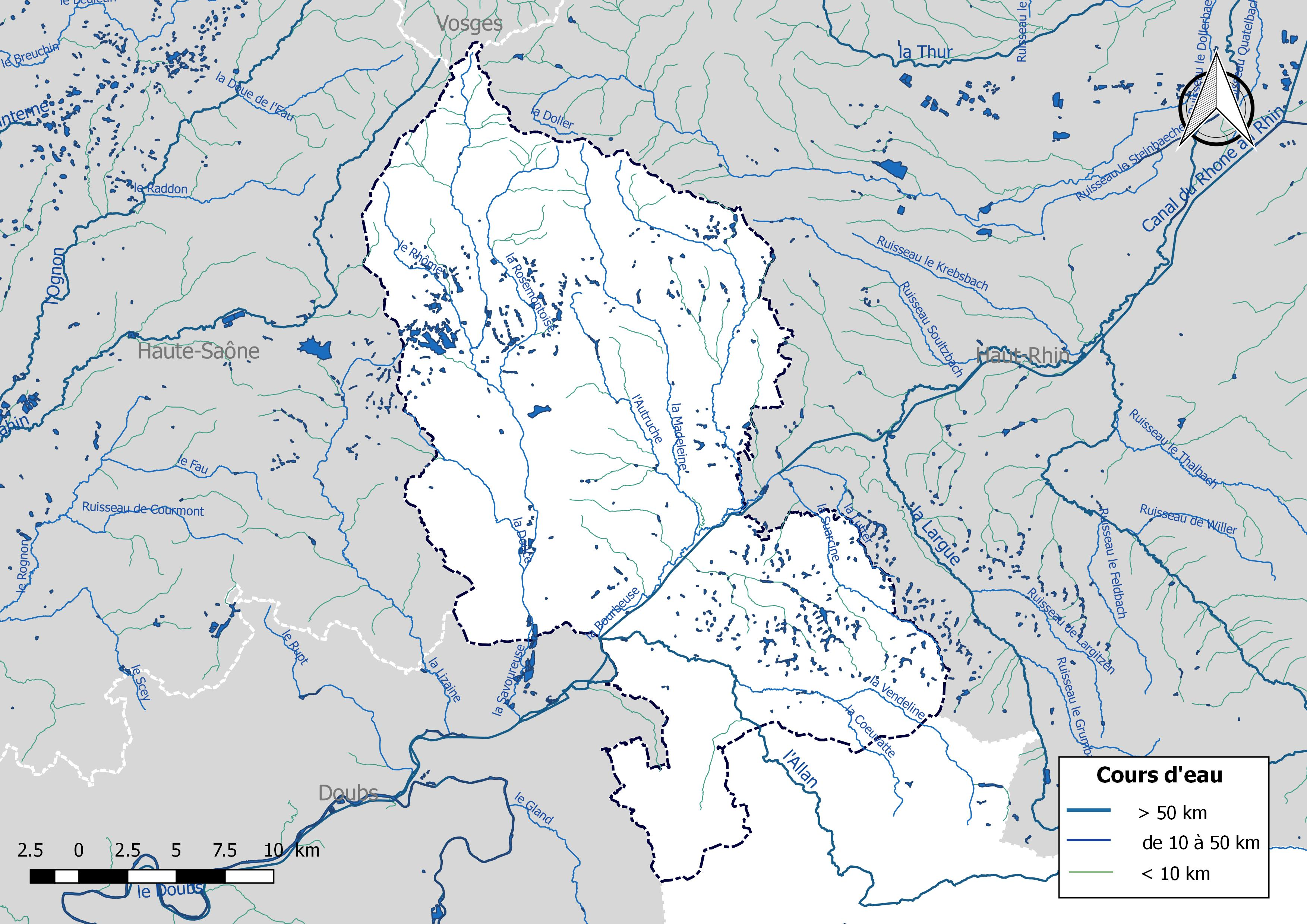 Réseau hydrographique du département du Territoire de Belfort (France).